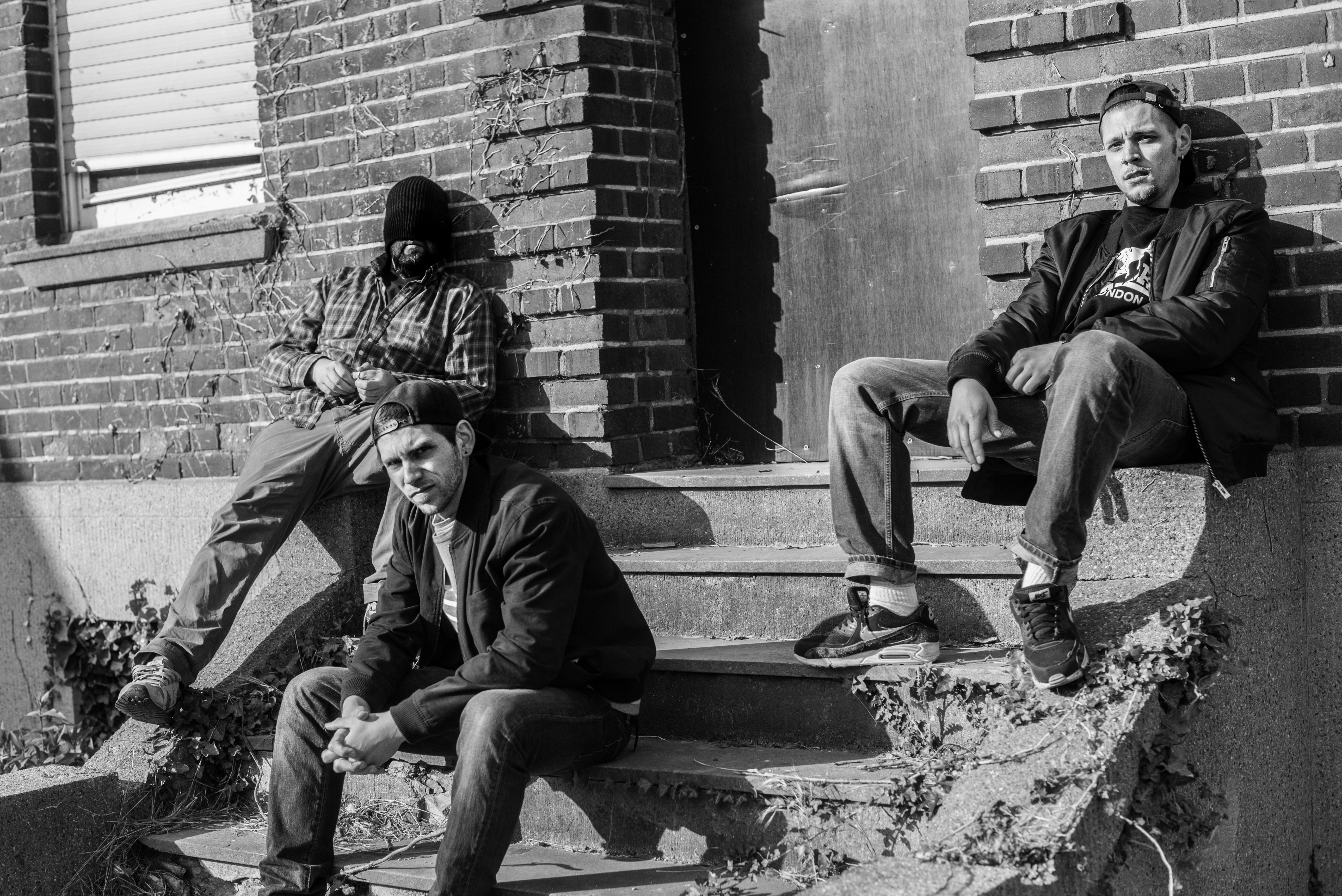 Pressefoto der Hip-Hop-Musiker Degenhardt und Kamikazes